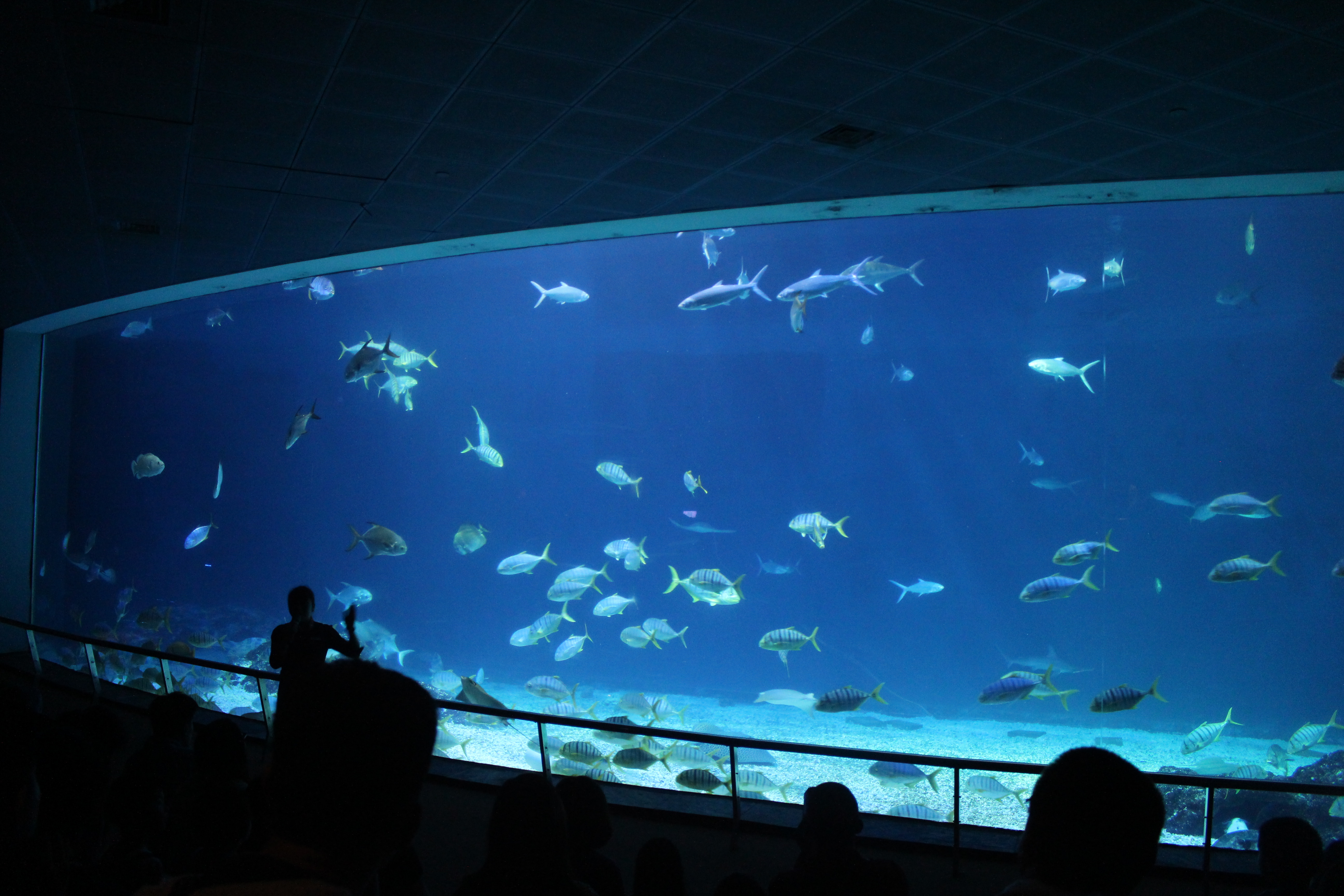 國立海洋生物博物館臺灣水域館大洋池。